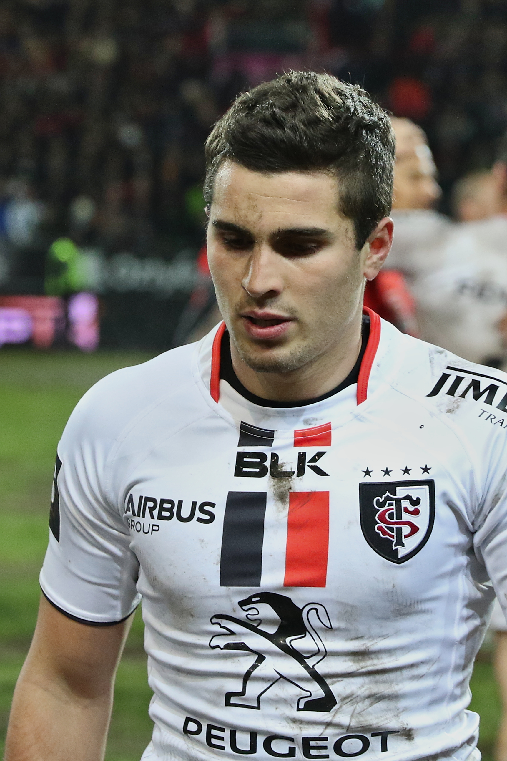 USO-ST - 20150306 - Sébastien Bézy